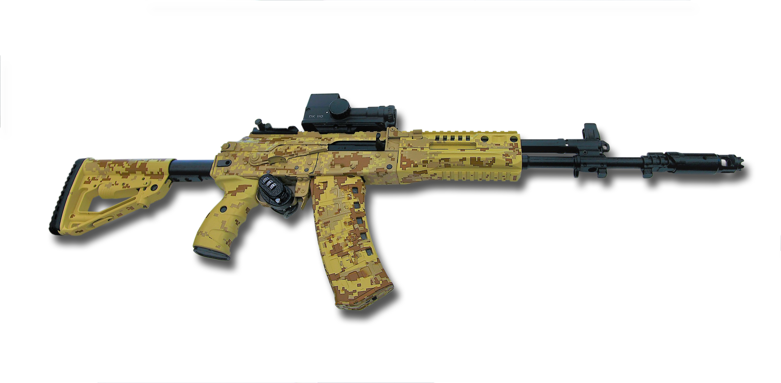 5,45mm AK-12 6P70 assault rifle